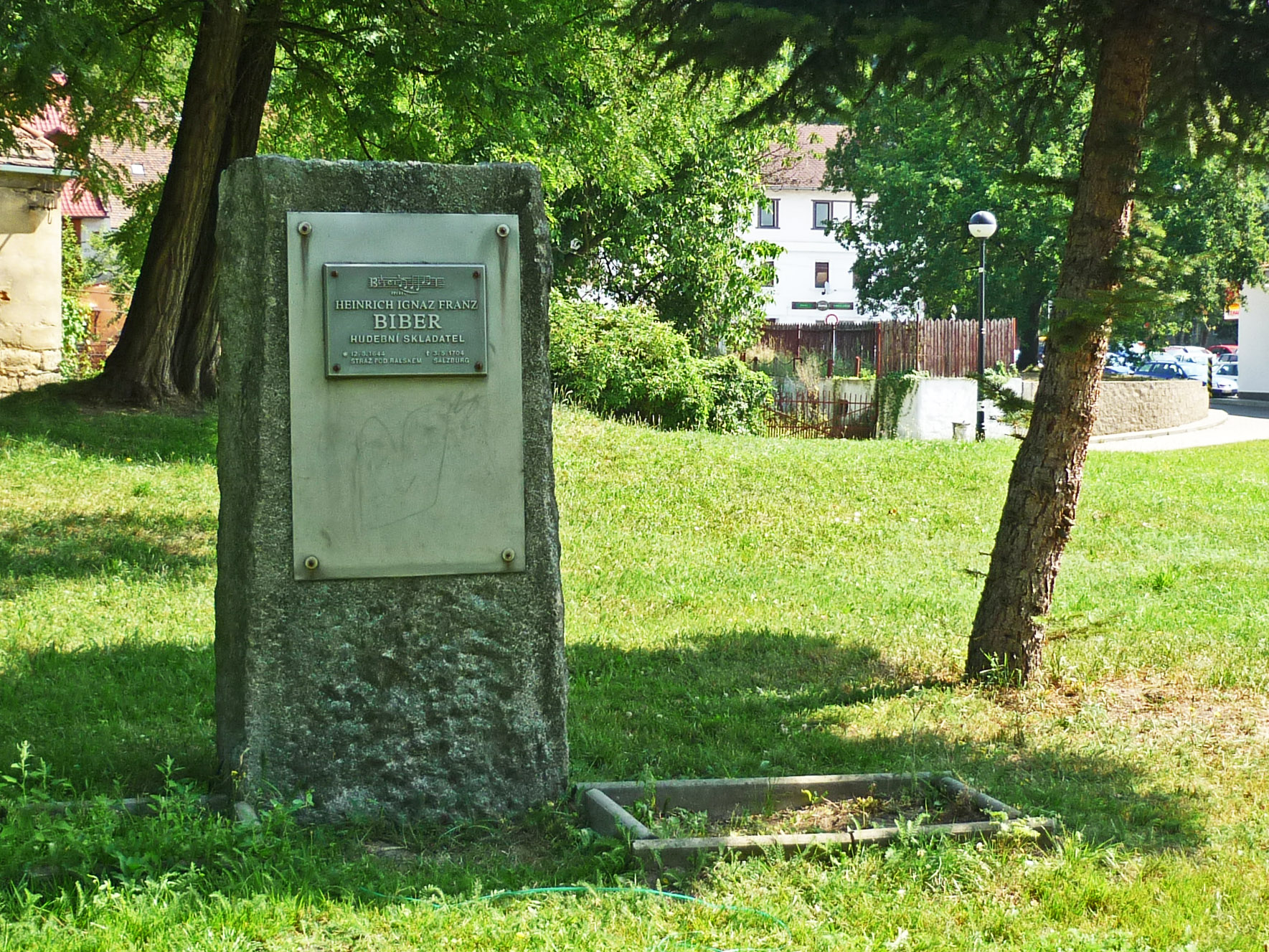 Denkmal für den Komponisten Heinrich Ignaz Franz Biber in Wartenberg am Roll (Stráž pod Ralskem)